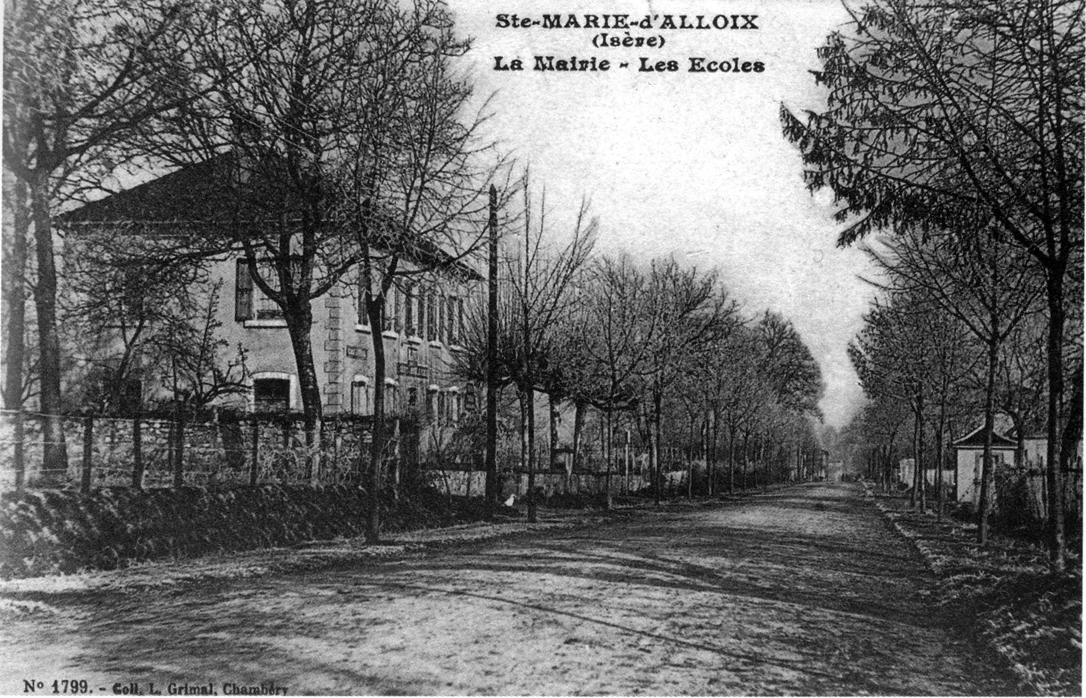 Sainte-Marie-d'Alloix, la mairie et les écoles en 1912